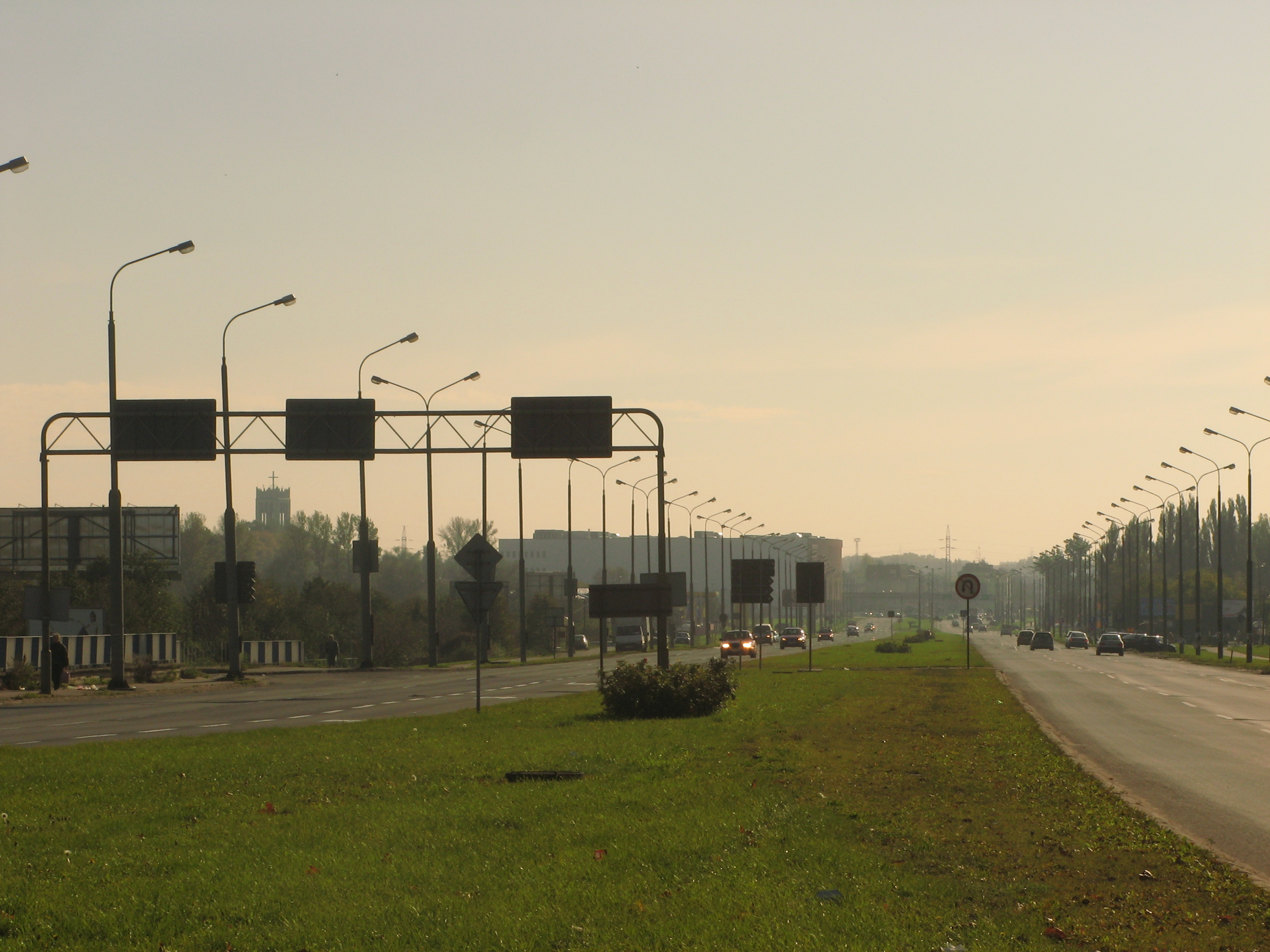 Aleje Unii Lubelskiej w Lublinie